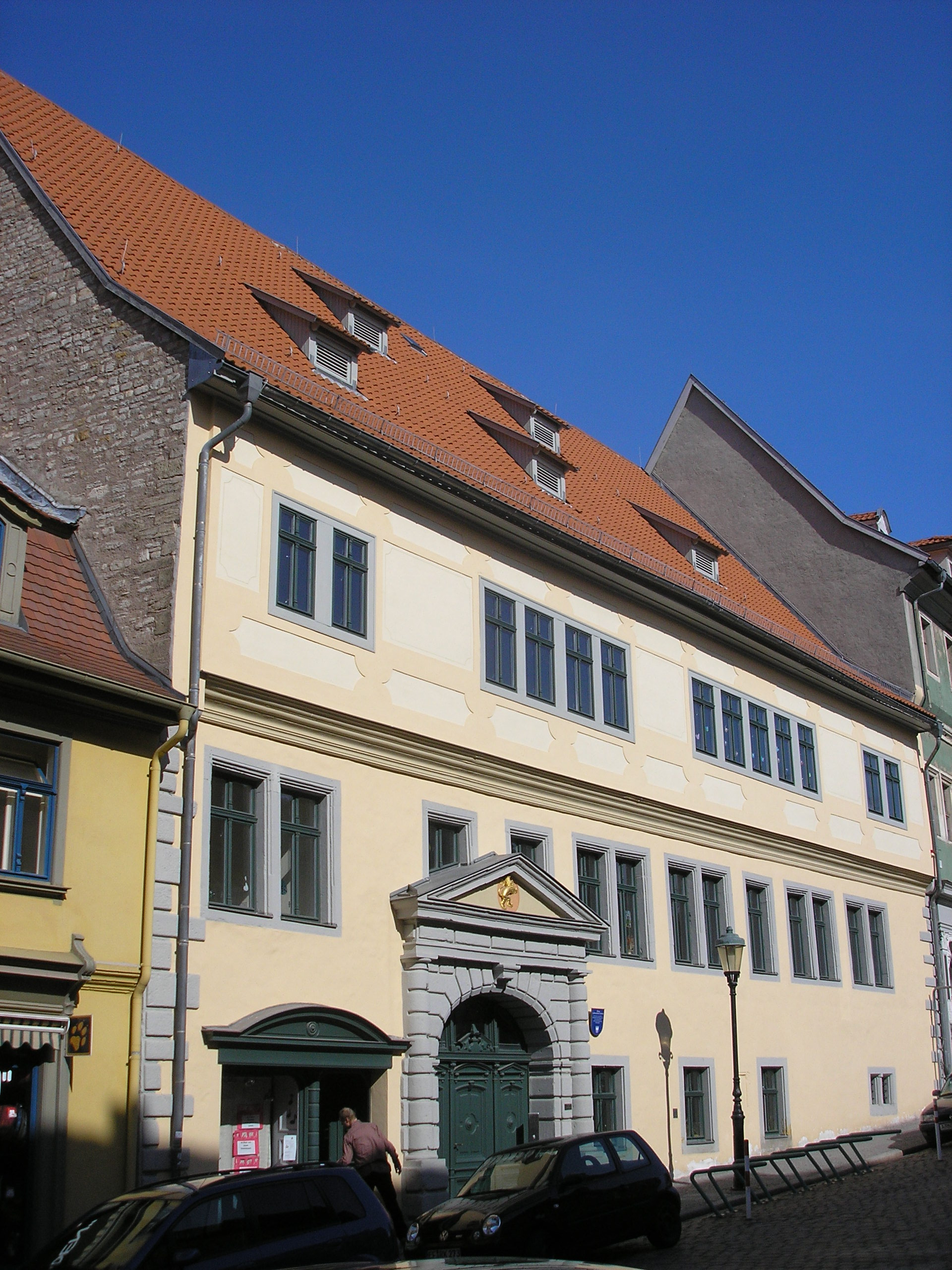 Das Haus zum schwarzen Löwen am Markt in Arnstadt (Thüringen).